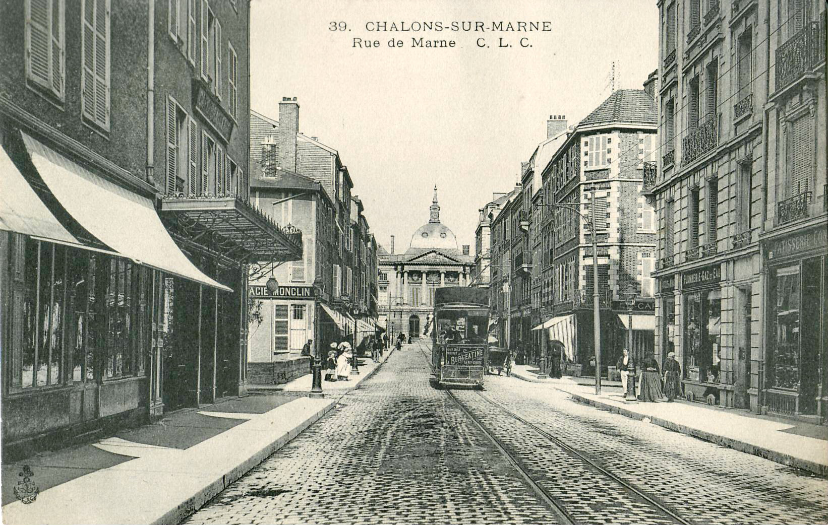 Carte postale ancienne éditée par Ancre, n°39 : CHÂLONS-SUR-MARNE - Rue de Marne